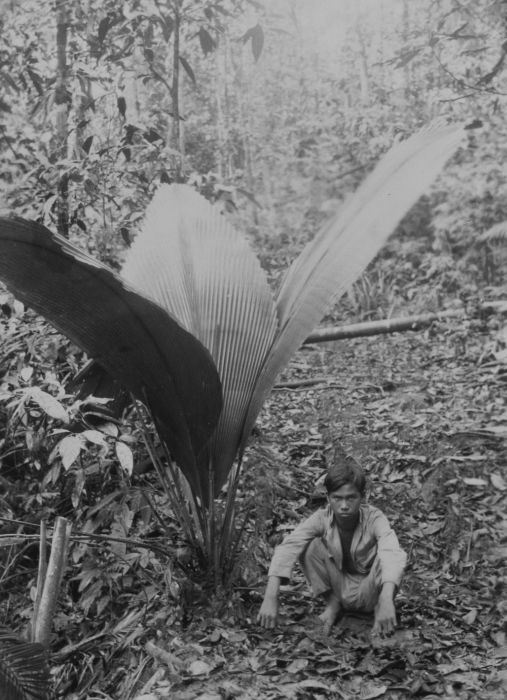 foto. Een Indonesische jongen poseert naast een palm, de Johannesteijsmannia altifrons, in een bos op Noord-Sumatra